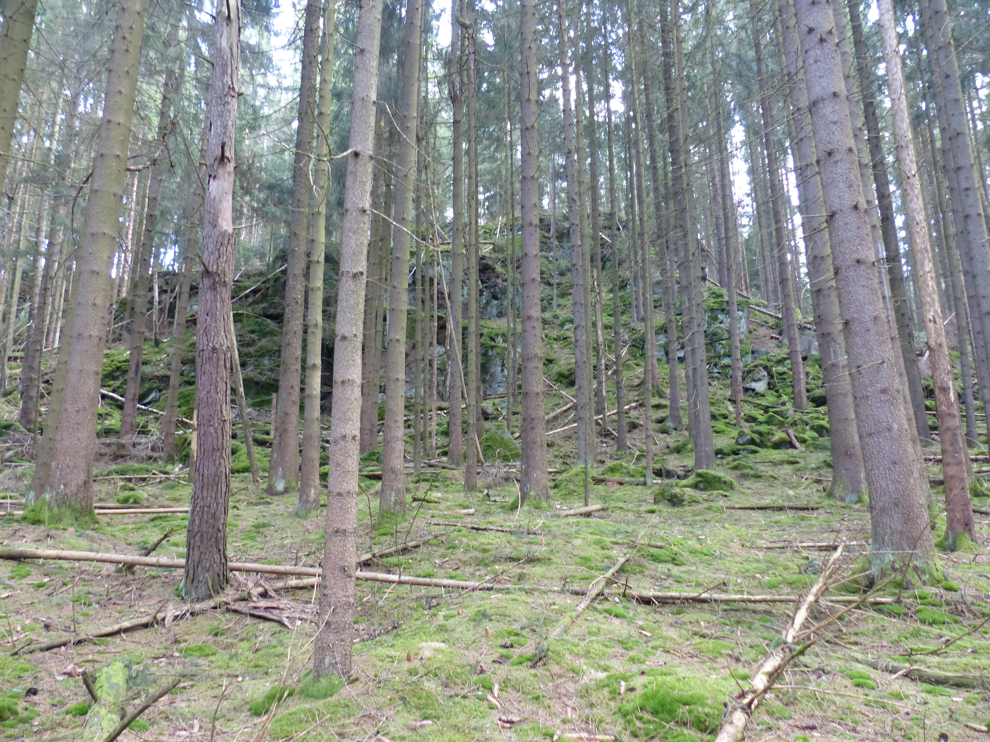 Geotop Augengneisfelsen Schauenstein 2018